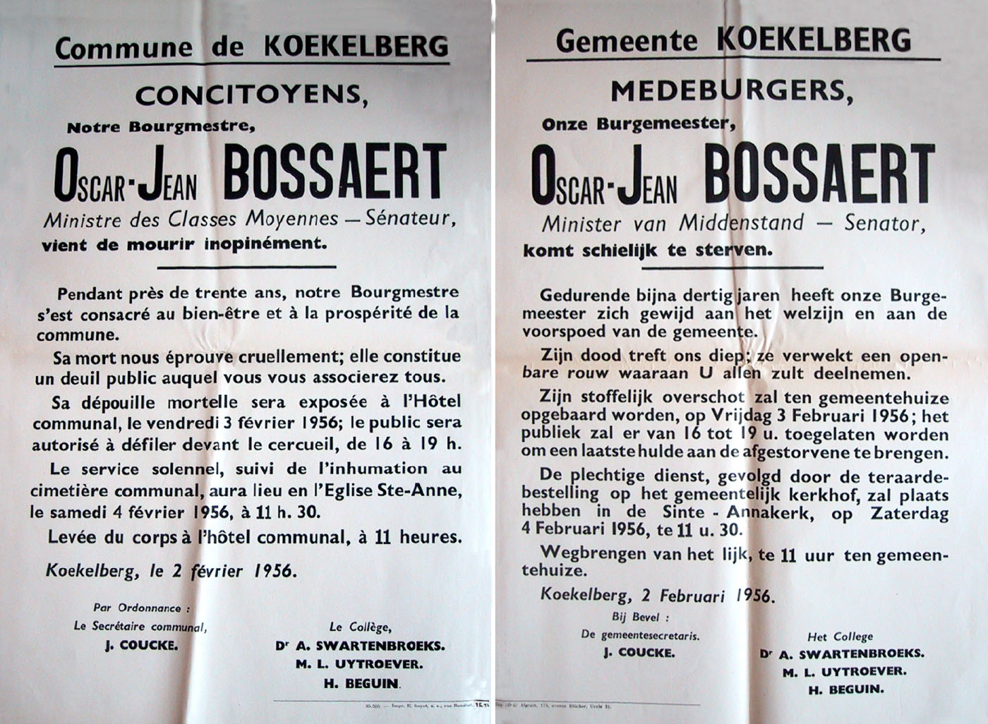 Affiche annonçant le décés d'Oscar Bossaert.